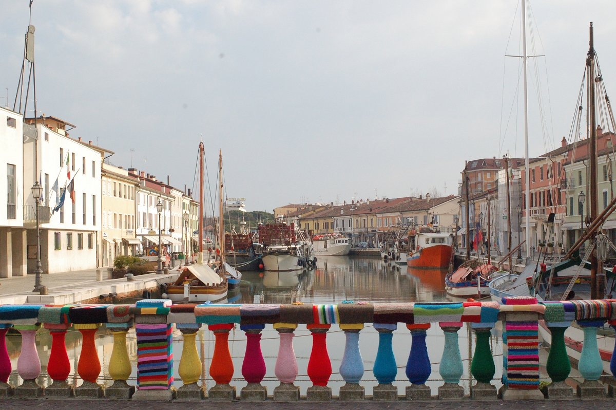 Yarn Bombing on bridge of Cesenatico (Italy)